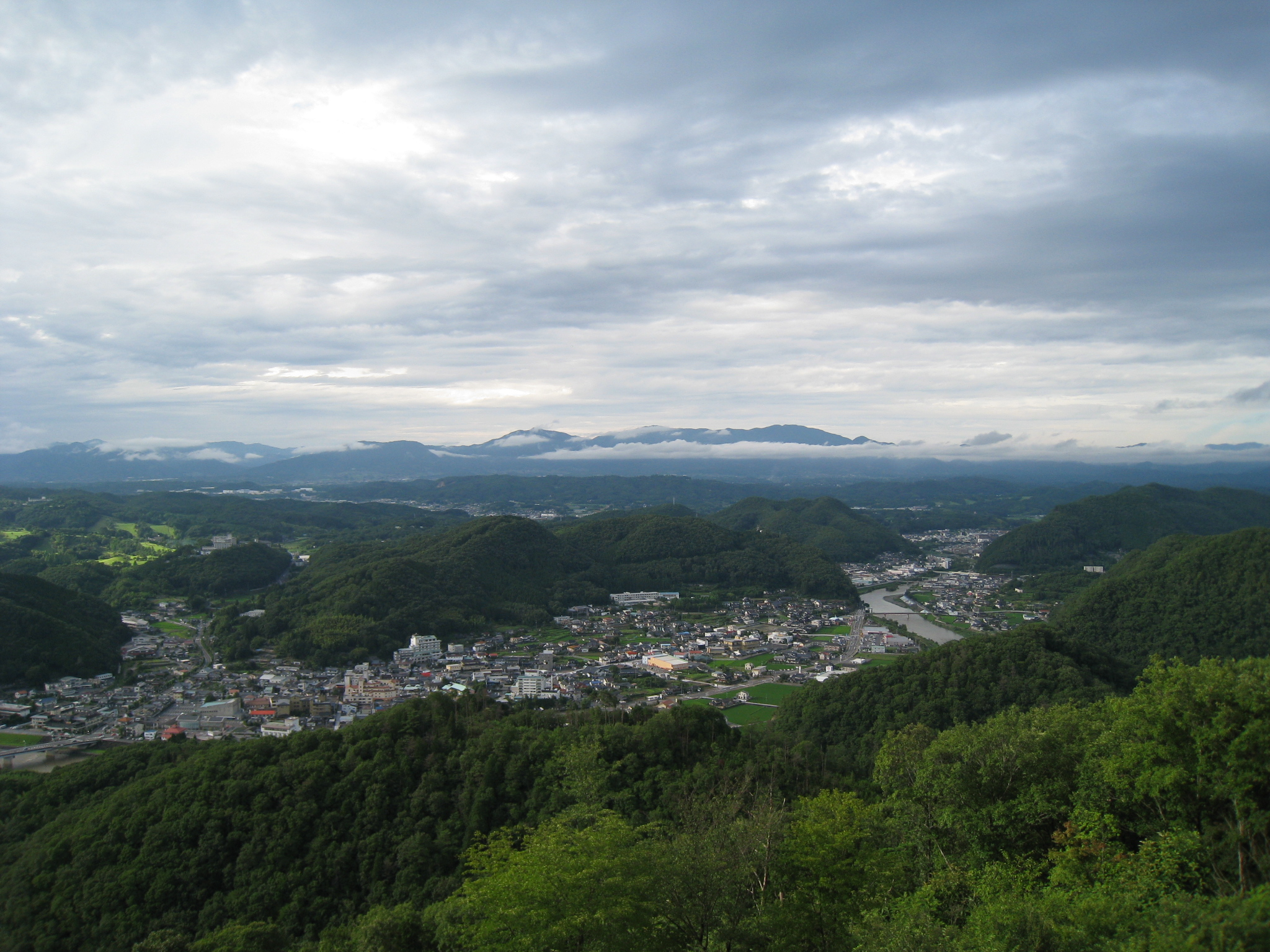 Oyama view.